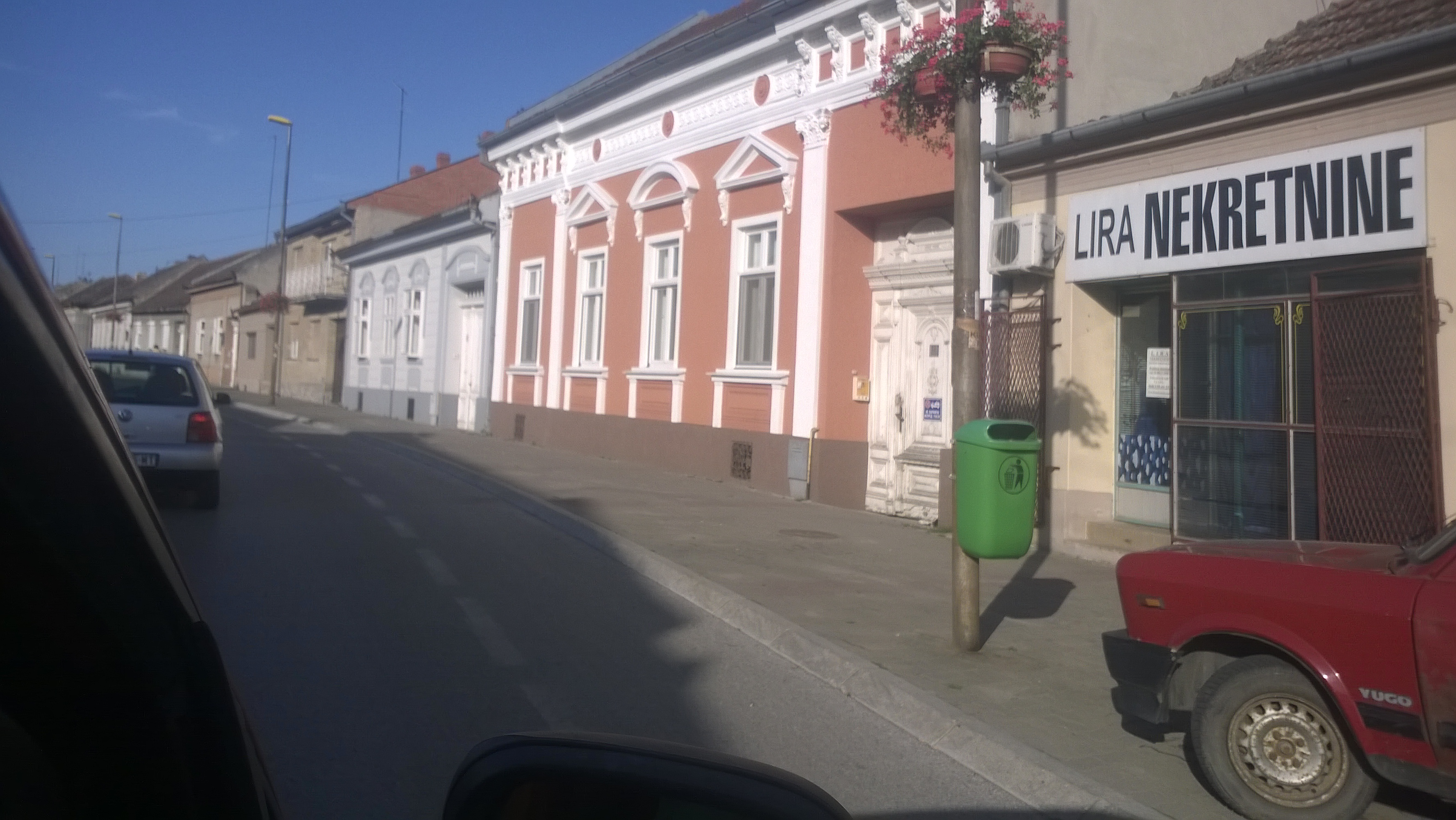 Pavliš, Serbia